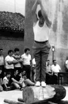 Mikel Mindegia aizkolari (bucheron) à Zubieta (Navarre), Espagne.